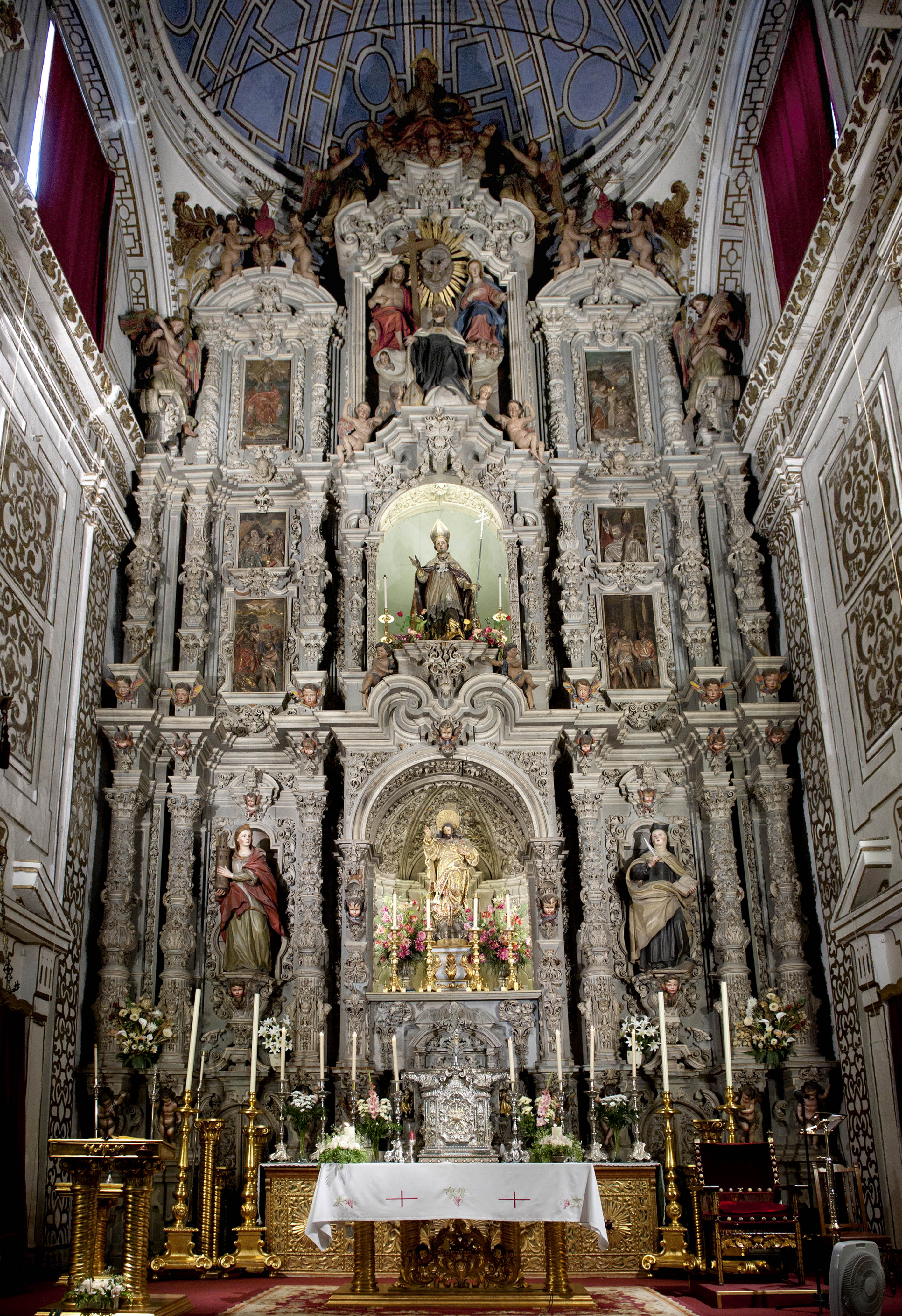 Pedro Duque Cornejo, Retablo Mayor, 1747, monasterio de San Leandro, Sevilla. Foto: Antonio del Junco.